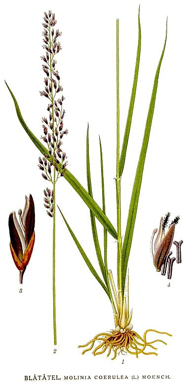 Molinia caerulea (L.) Moench s. str. Original Description "Blåtåtel", Molinia coerulea (L.) Moench